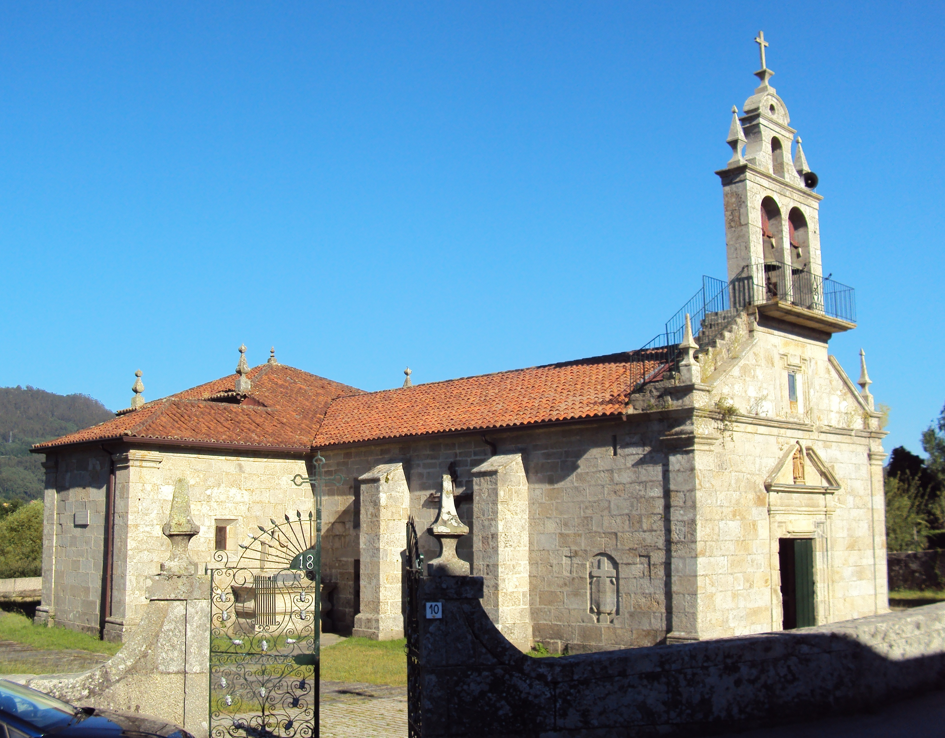 Iglesia parroquial de San Félix de Nigrán.